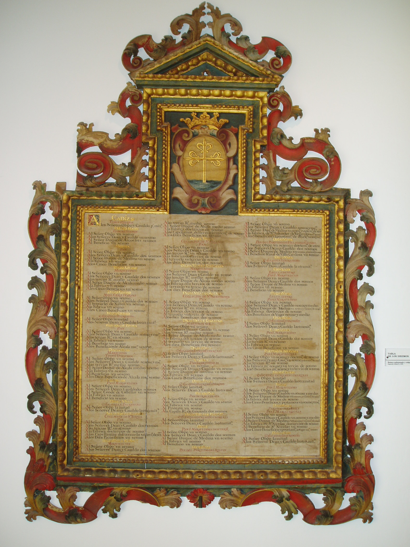 Tabla de Diezmos de la segunda mitad del siglo XVII en la Casa del Obispo de Cádiz, España.